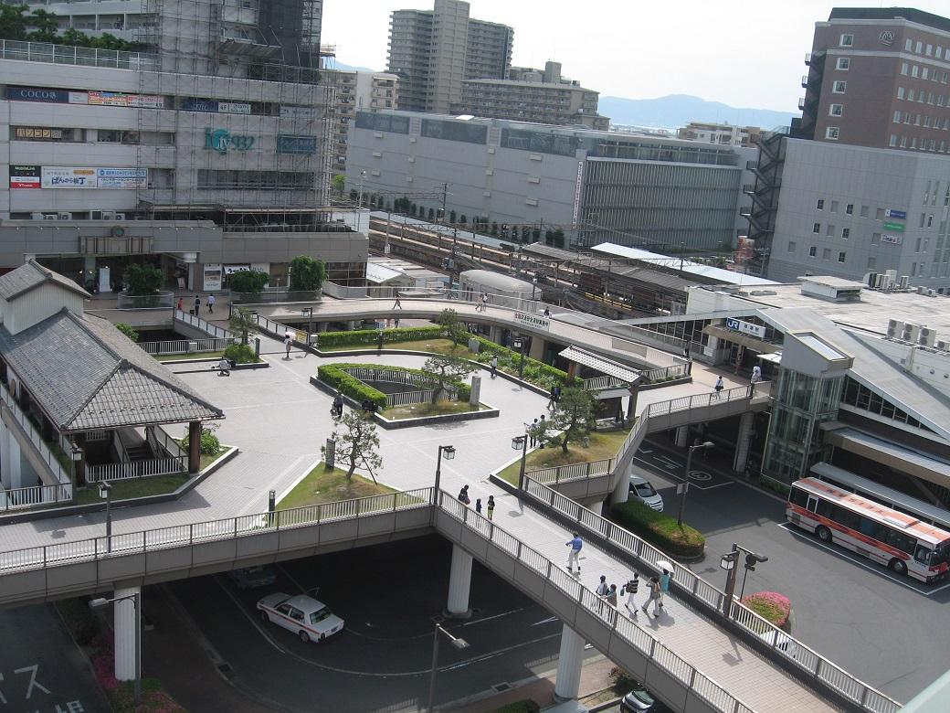 草津駅前風景 東口高所より